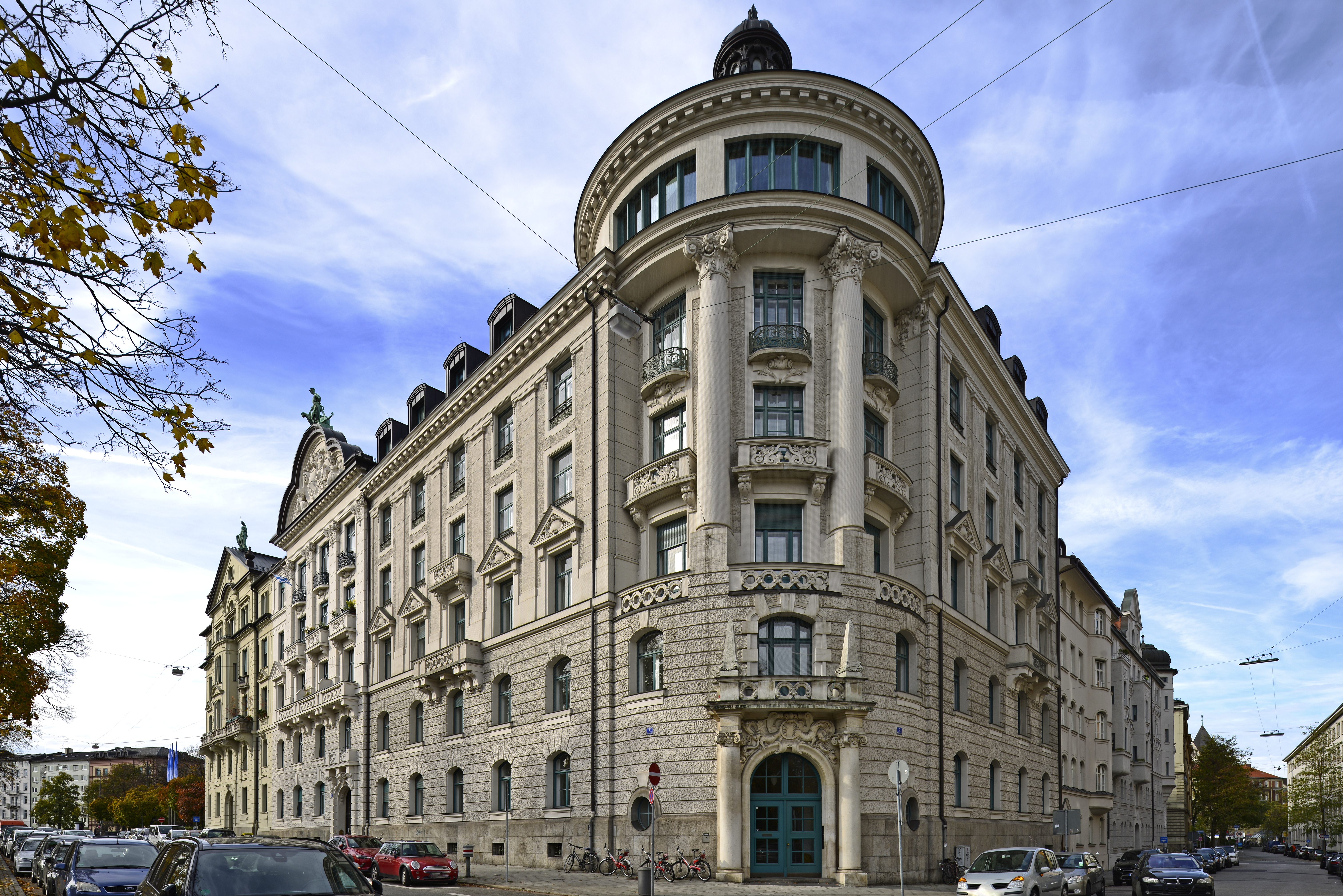 Eckhaus Widenmayerstraße 3 / Gewürzmühlstraße in München-Lehel; erbaut 1898-1900 nach Entwurf des Architekten August Nopper für die Bauunternehmung Vogt & Prestele; unter Denkmalschutz